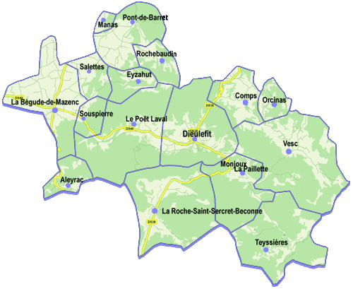 Carte du Pays de Dieulefit, soit le canton de Dieulefit plus Manas.